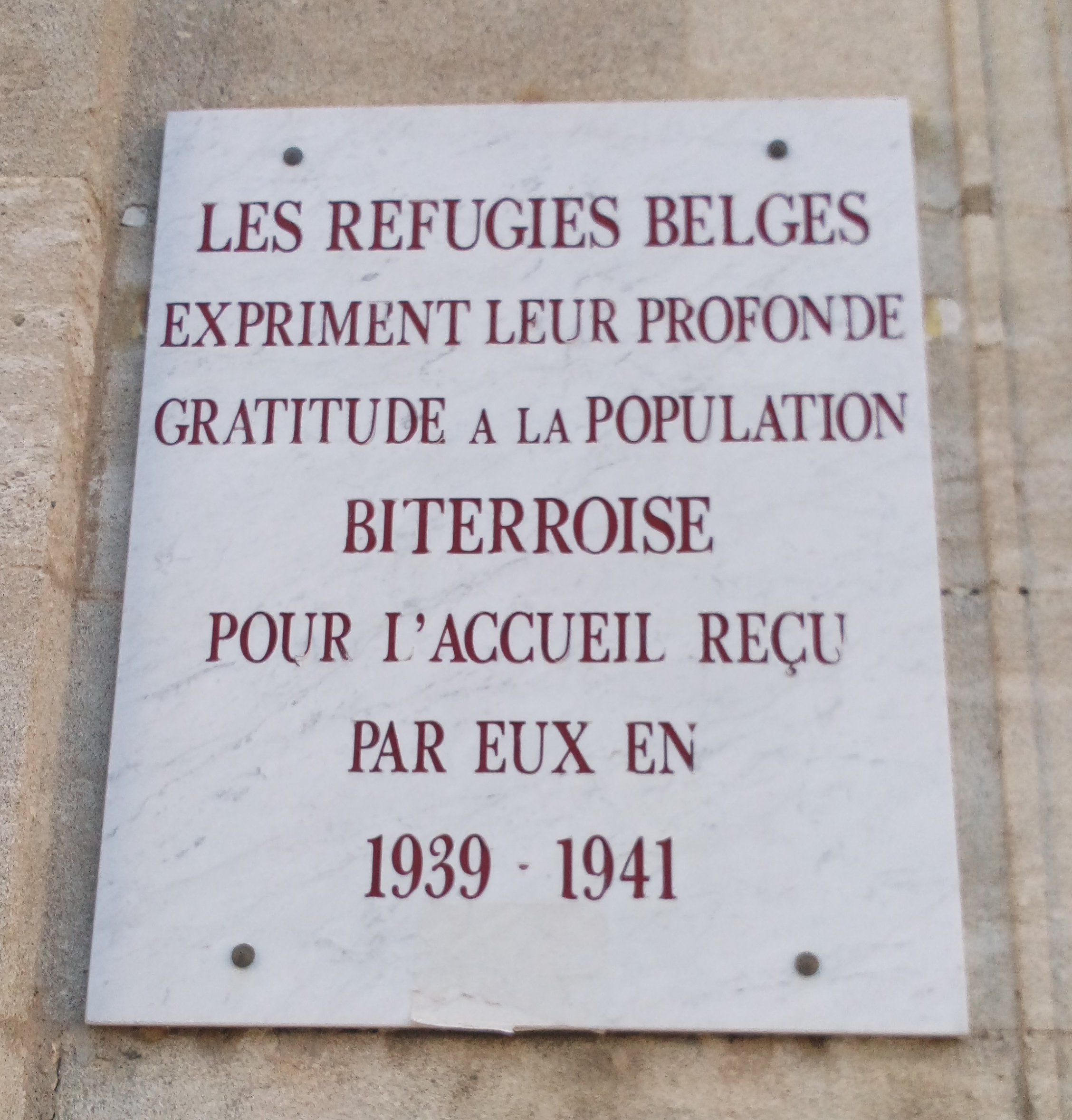 Plaque commémorative de l'accueil des réfugiés belges à Béziers lots du début de la deuxième guerre mondiale. Béziers.